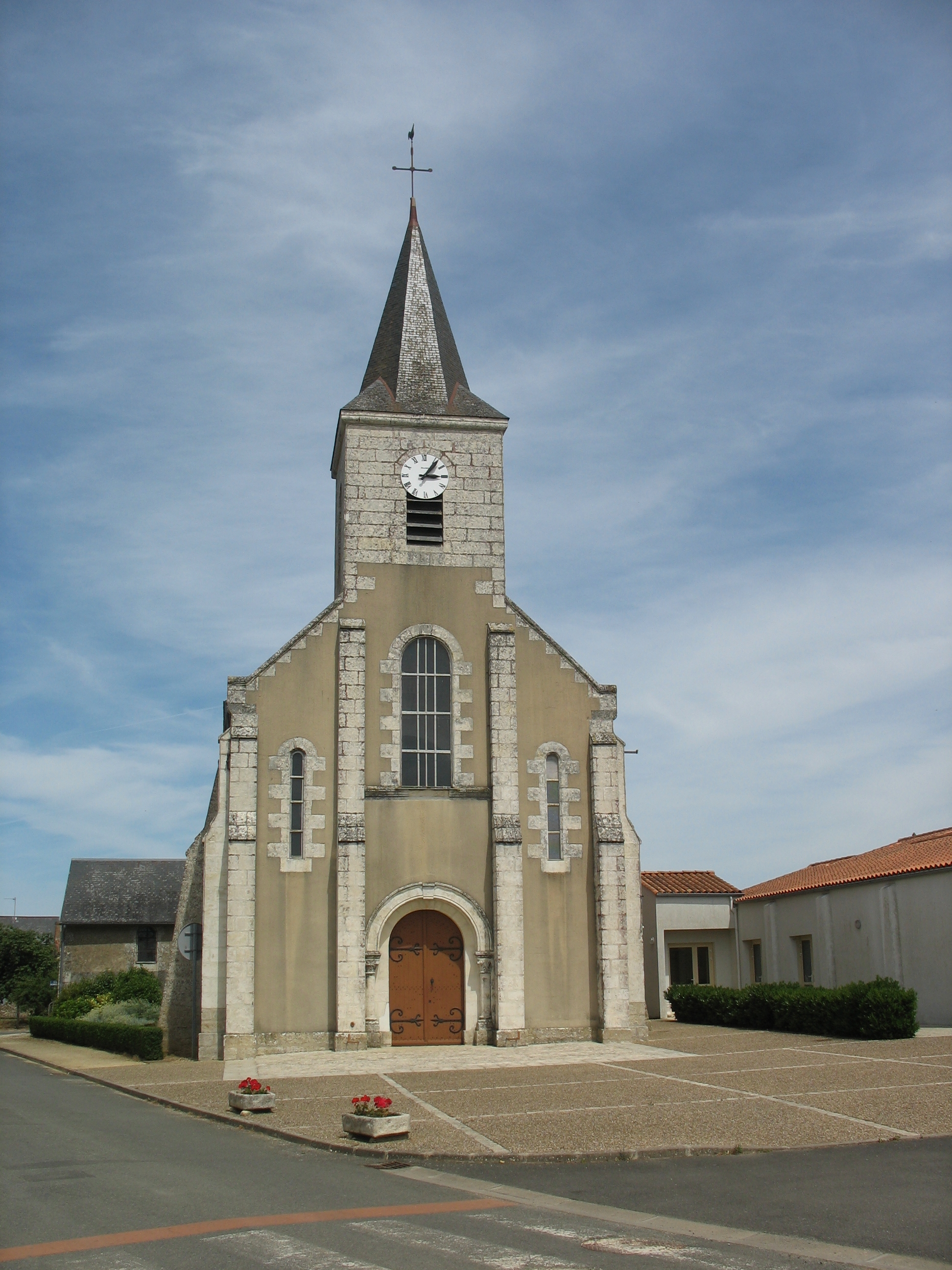 Vue de face de l'église de Doux